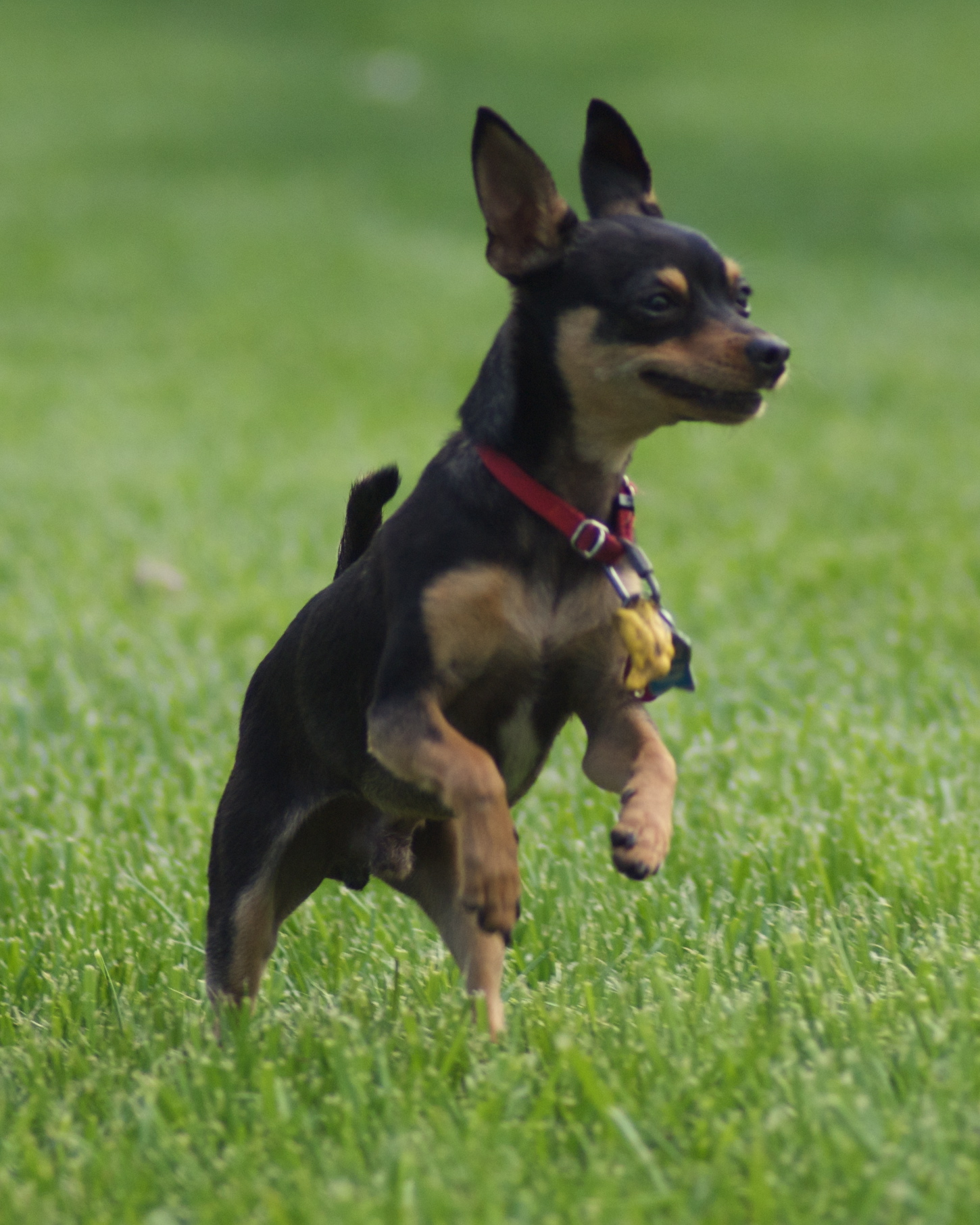 Lennie, Toy Manchester Terrier